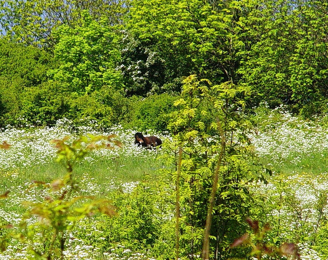 Wildes Pferd auf der Insel Greifswalder Oie